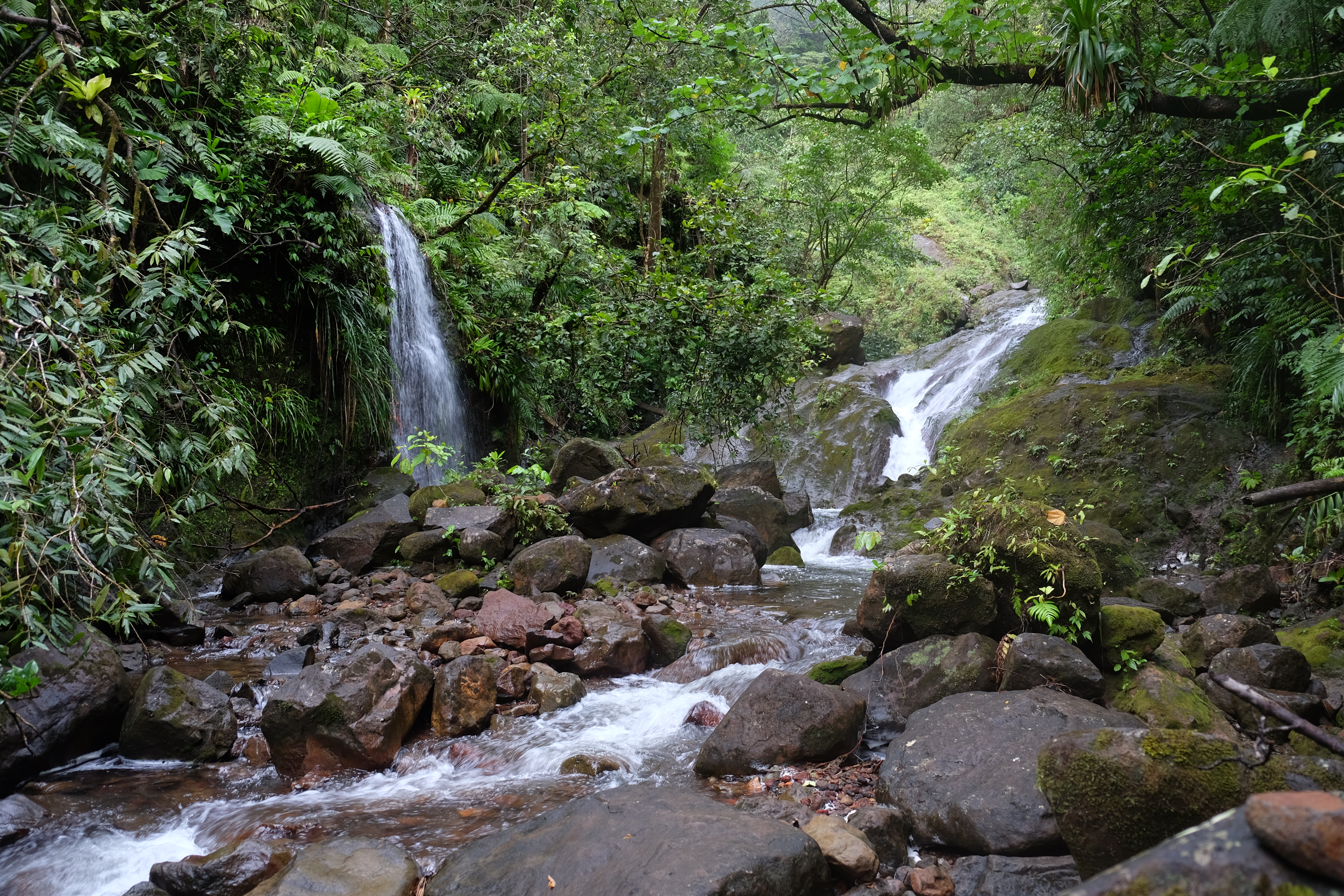 Traversée de la rivière du Galion avec une petite chute d'eau à gauche dans le Parc National de Guadeloupe.